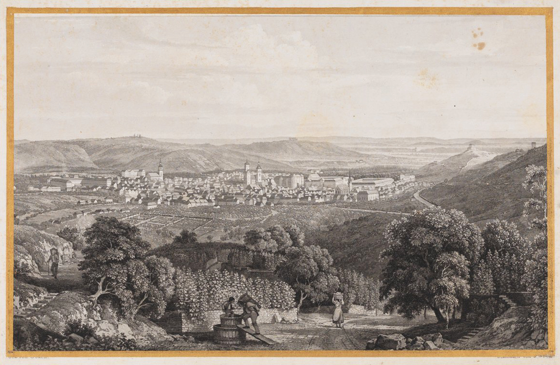 Panorama von Stuttgart von Degerloch aus (Ausschnitt)